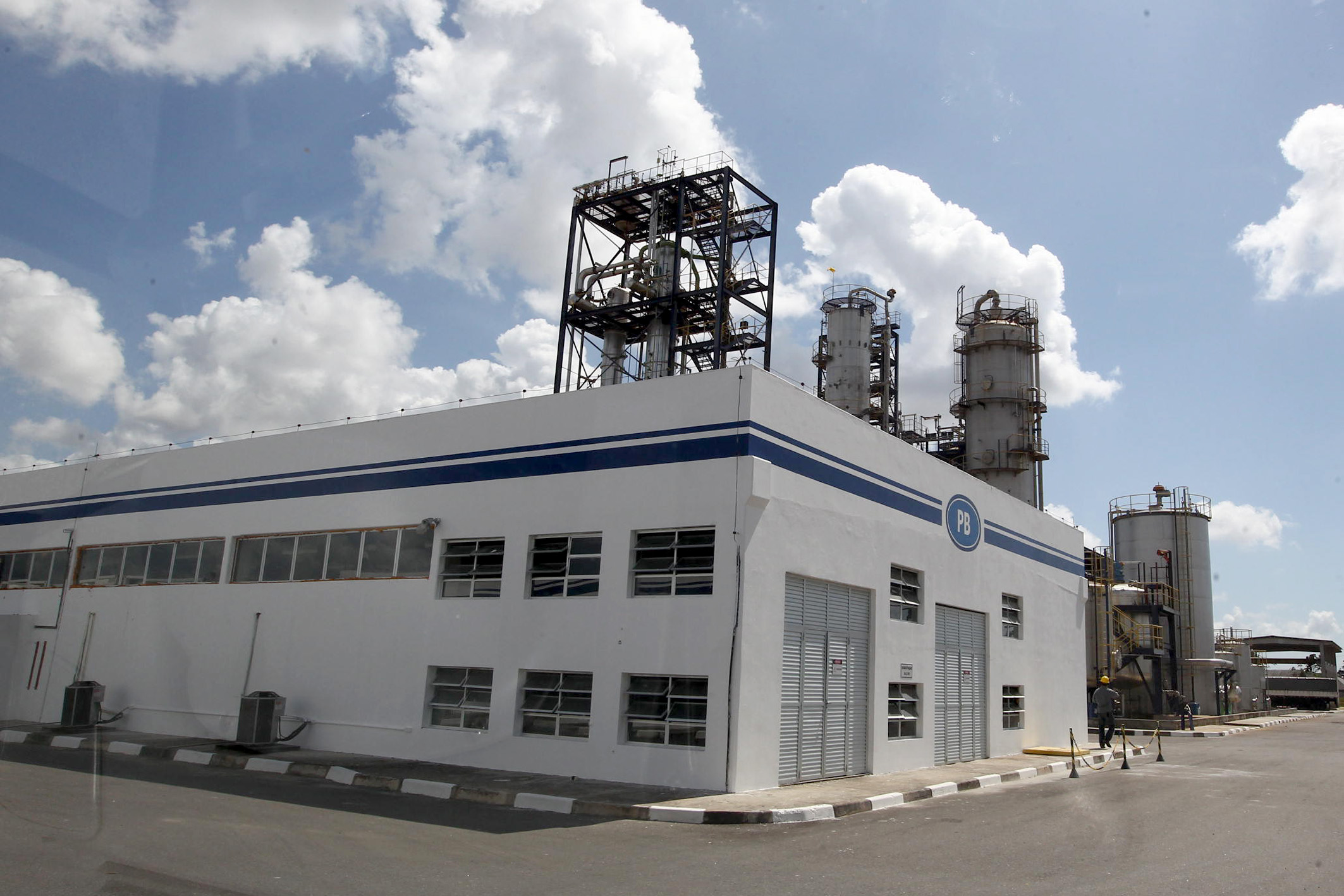 Governador Jaques Wagner participa da inauguração da Unidade de Hidrogênio da Peroxy Bahia, no Polo Petroquímico de Camaçari. Foto Manu Dias/ SECOM